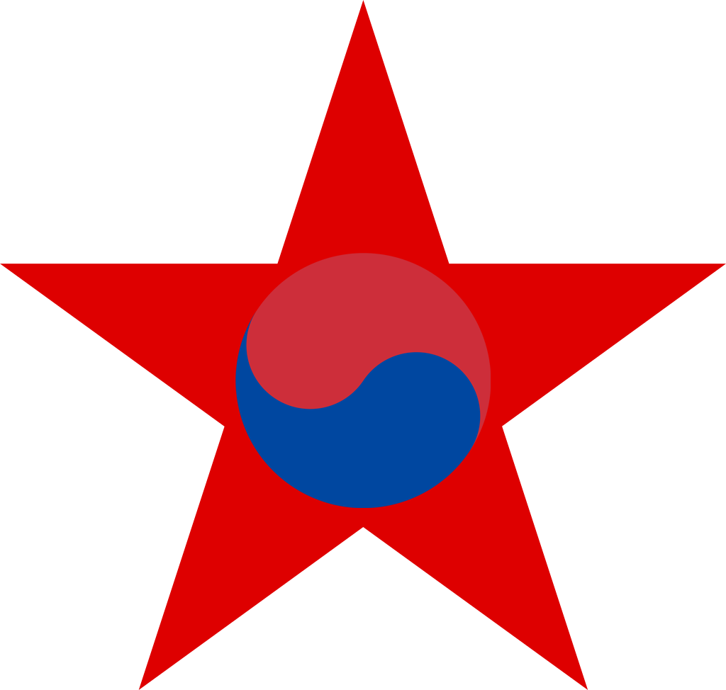 Logo del Frente Democrático para la Reunificación de la Patria